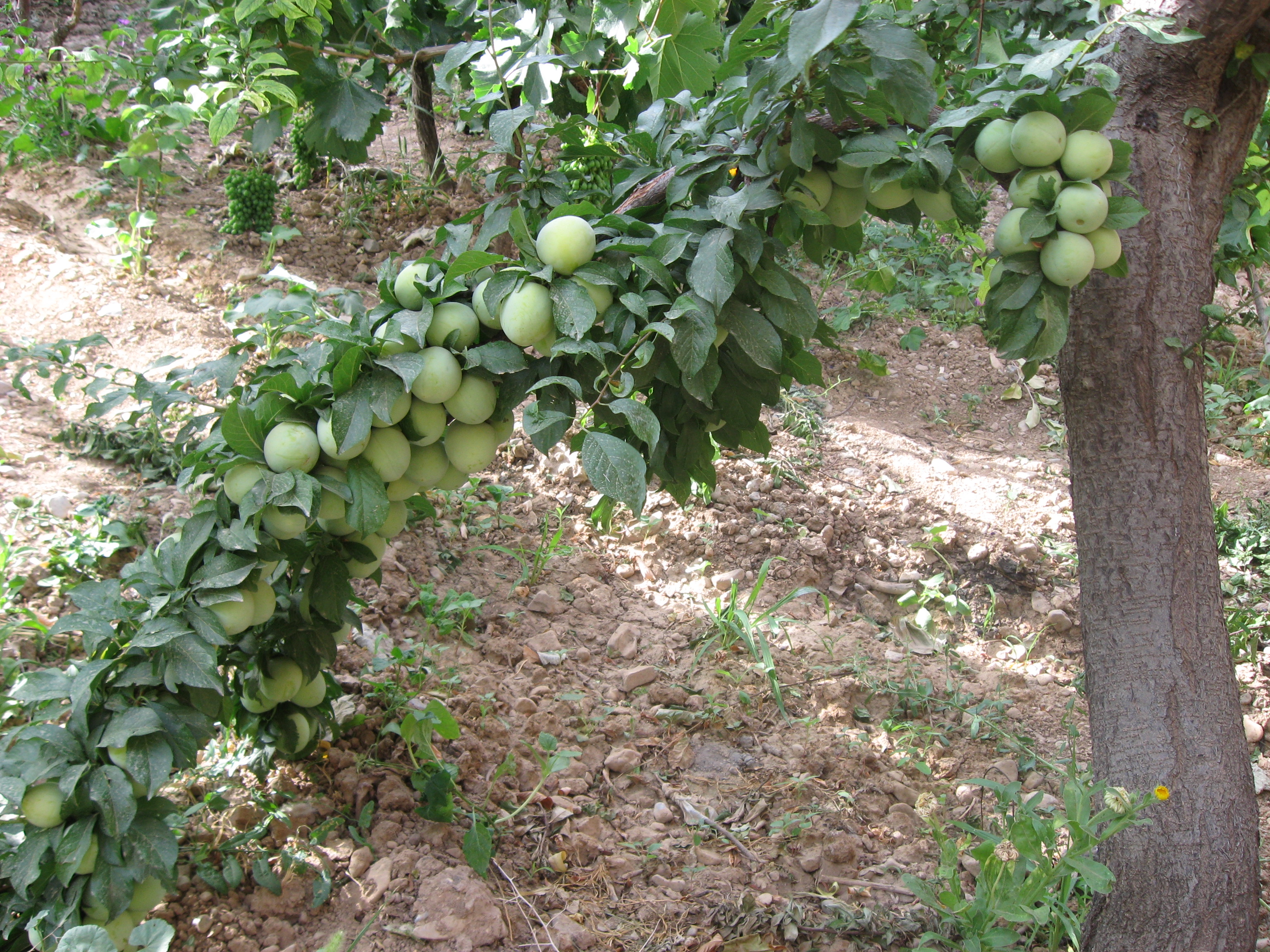 این عکس مربوط به درخت آلو زرد ر در روستای زالی است که توسط احمد نیک گفتار بر پایه درخت لوشی پیوند خورده است.